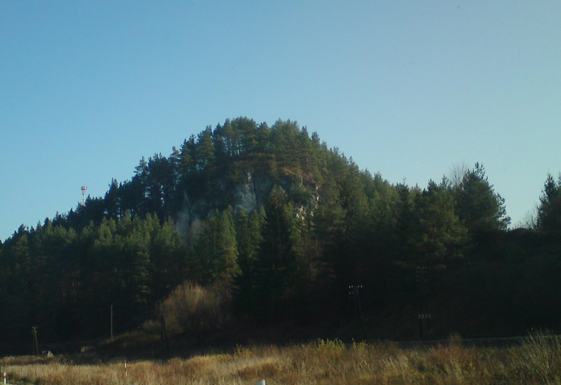 Turská skala od juhu